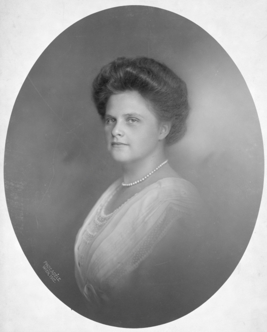 Maria de los Dolores, Erzherzogin von Österreich-Toskana.